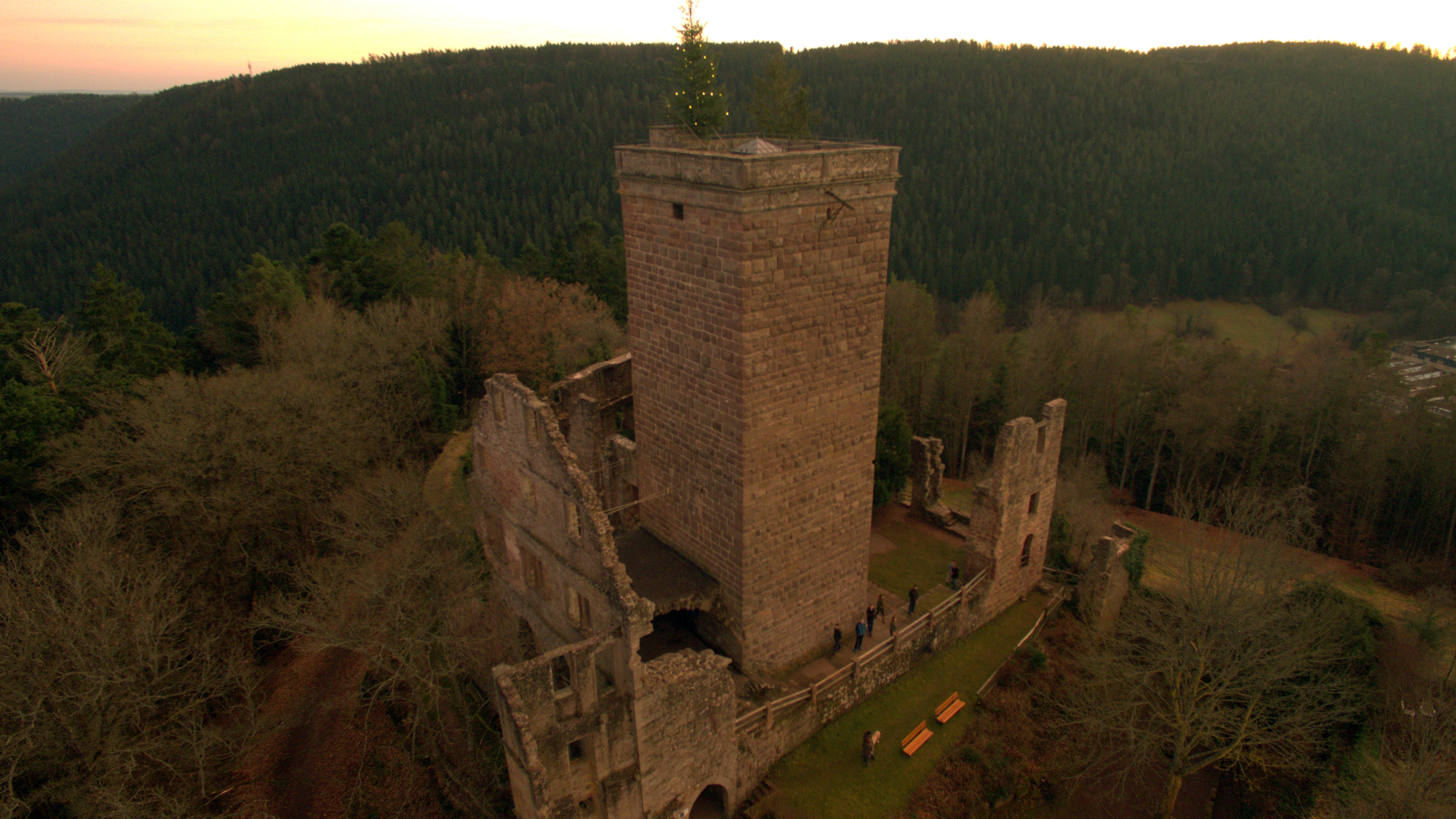 Burgruine Zavelstein zu Weihnachten